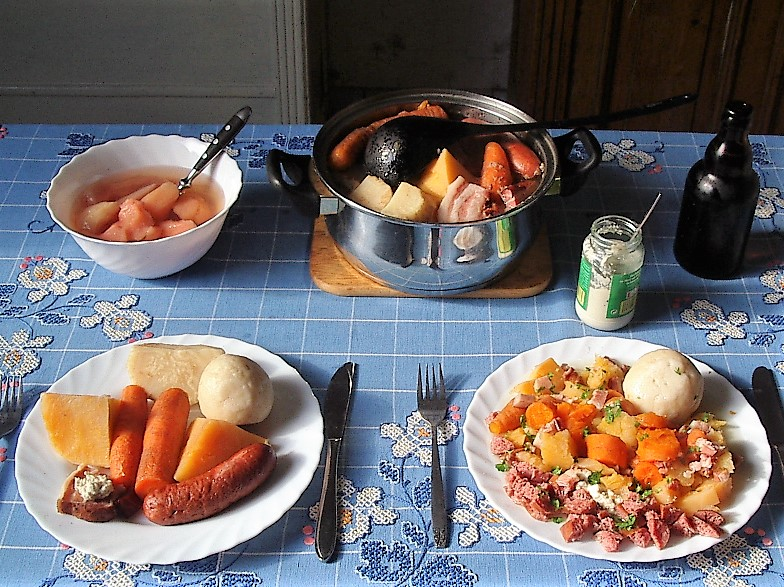 Norddeutscher Steckrübeneintopf selbst fotografiert von Benutzer:Geoz own work by User:Geoz Oktober 2006